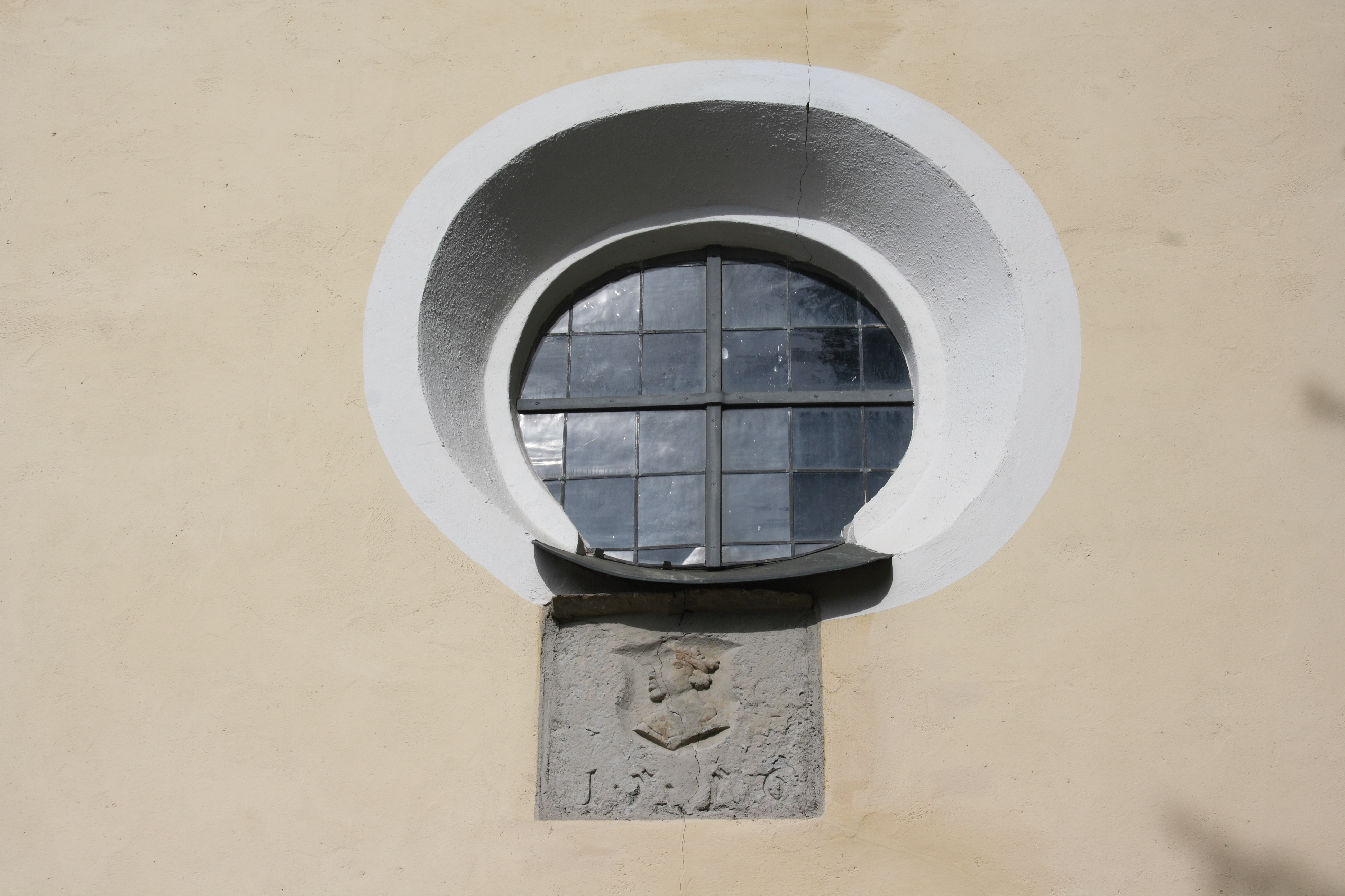 katholische Wallfahrtskirche St. Leonhard am Ried in Lauingen im Landkreis Dillingen an der Donau (Bayern), Wappen von Lauingen, bezeichnet 1556